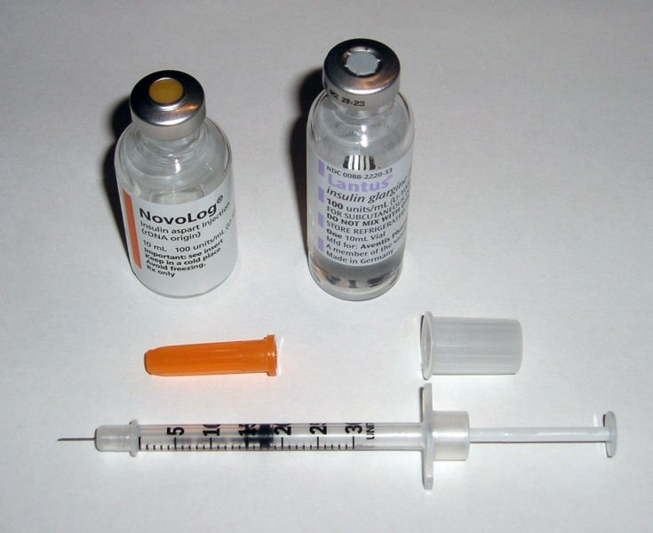 from Image:Standard insulin syringe.JPG taken by User:Mbbradford